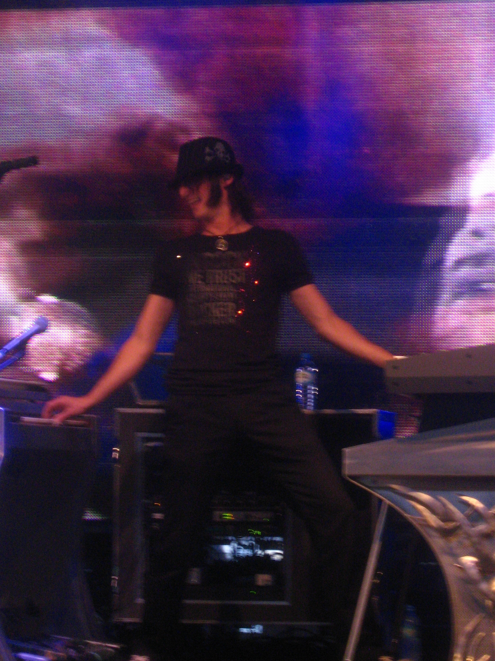 Sebastian Padotzke (Reamonn) podczas koncertu w Teatrze Letnim w Szczecinie. 5 lipca 2008.